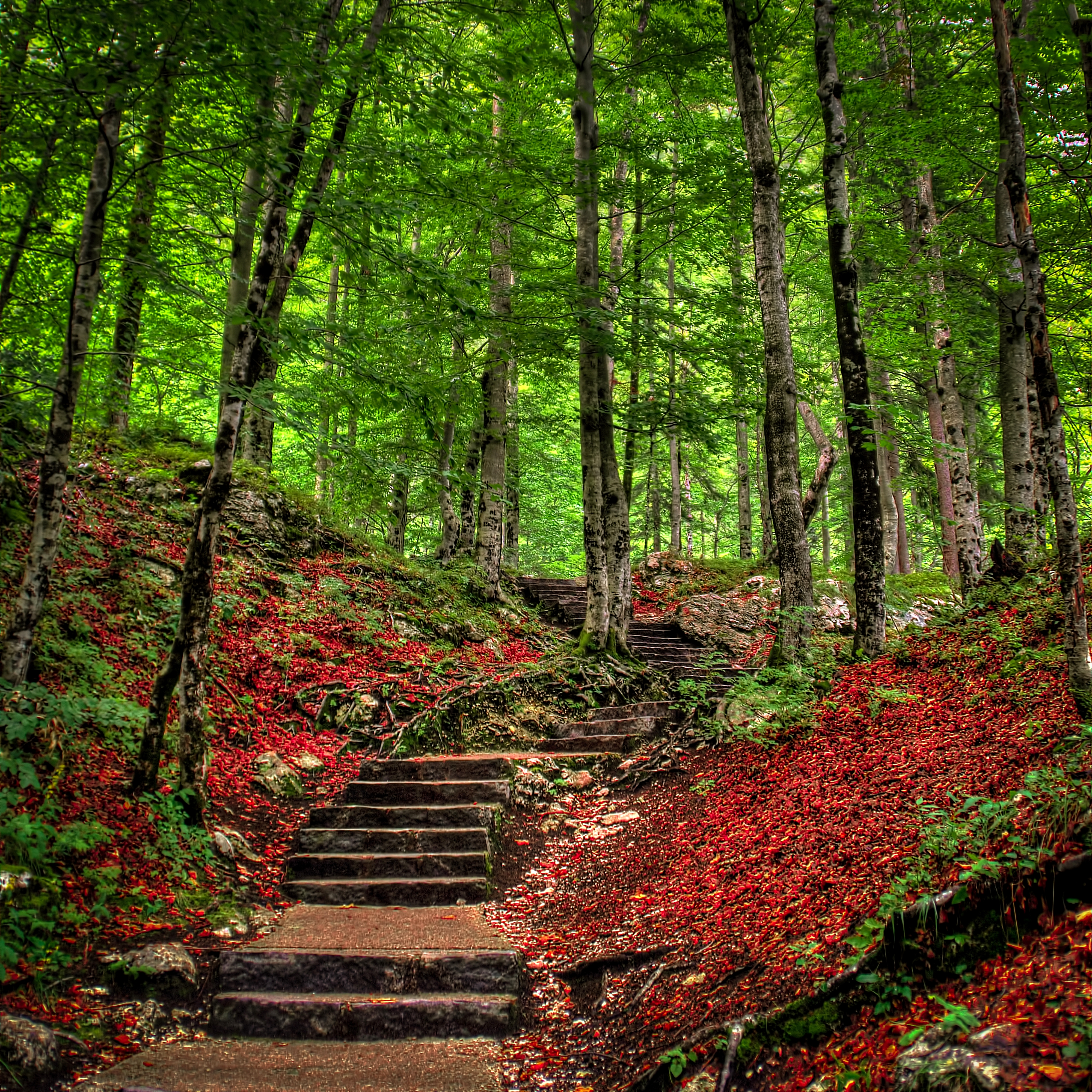 Bosque